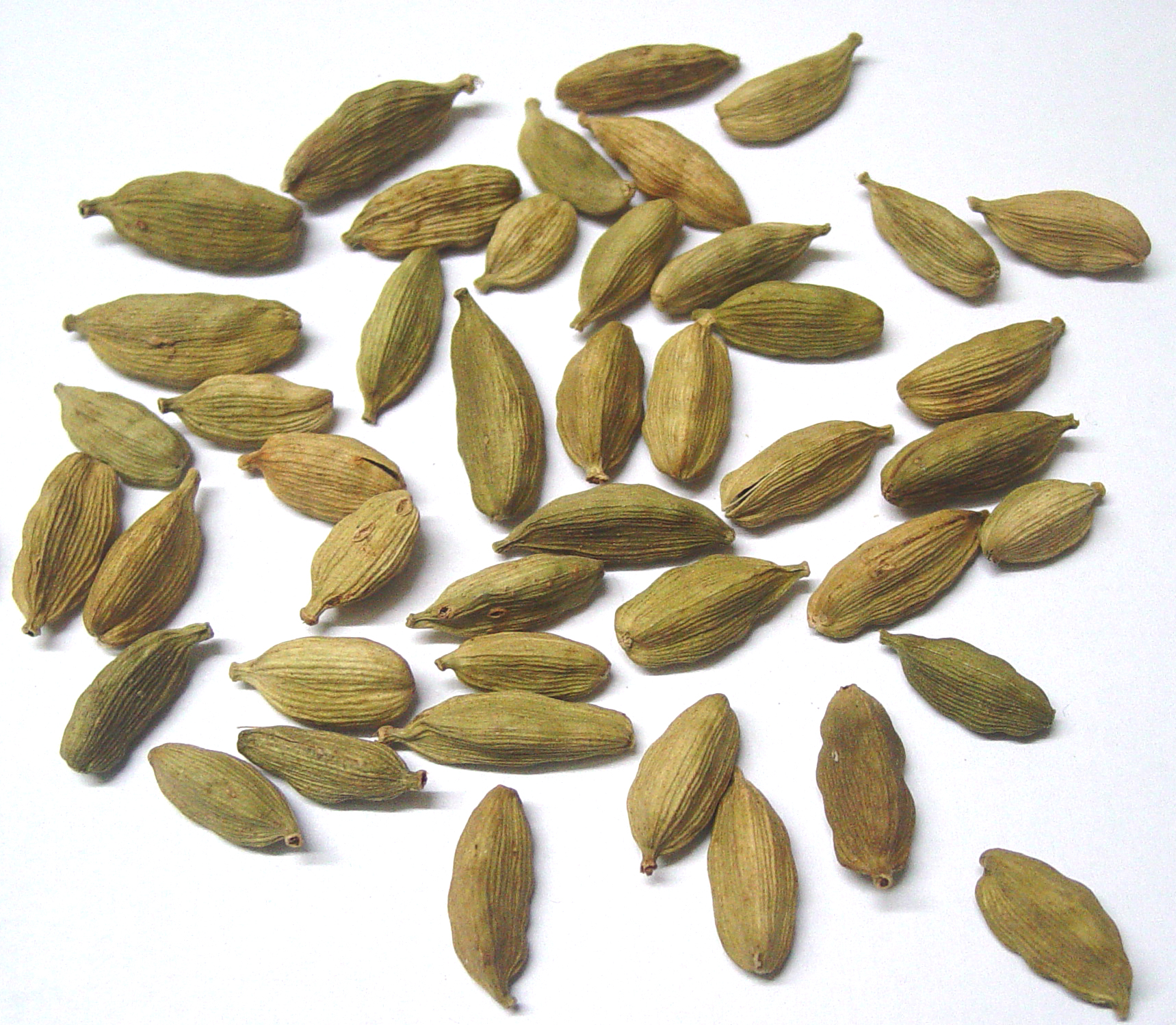 ഏലക്ക